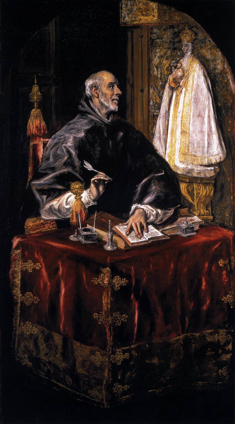 La obra representa al prelado español San Ildefonso de Toledo (607-667), que fue arzobispo de Toledo y era hermano del también arzobispo San Isidoro de Sevilla.